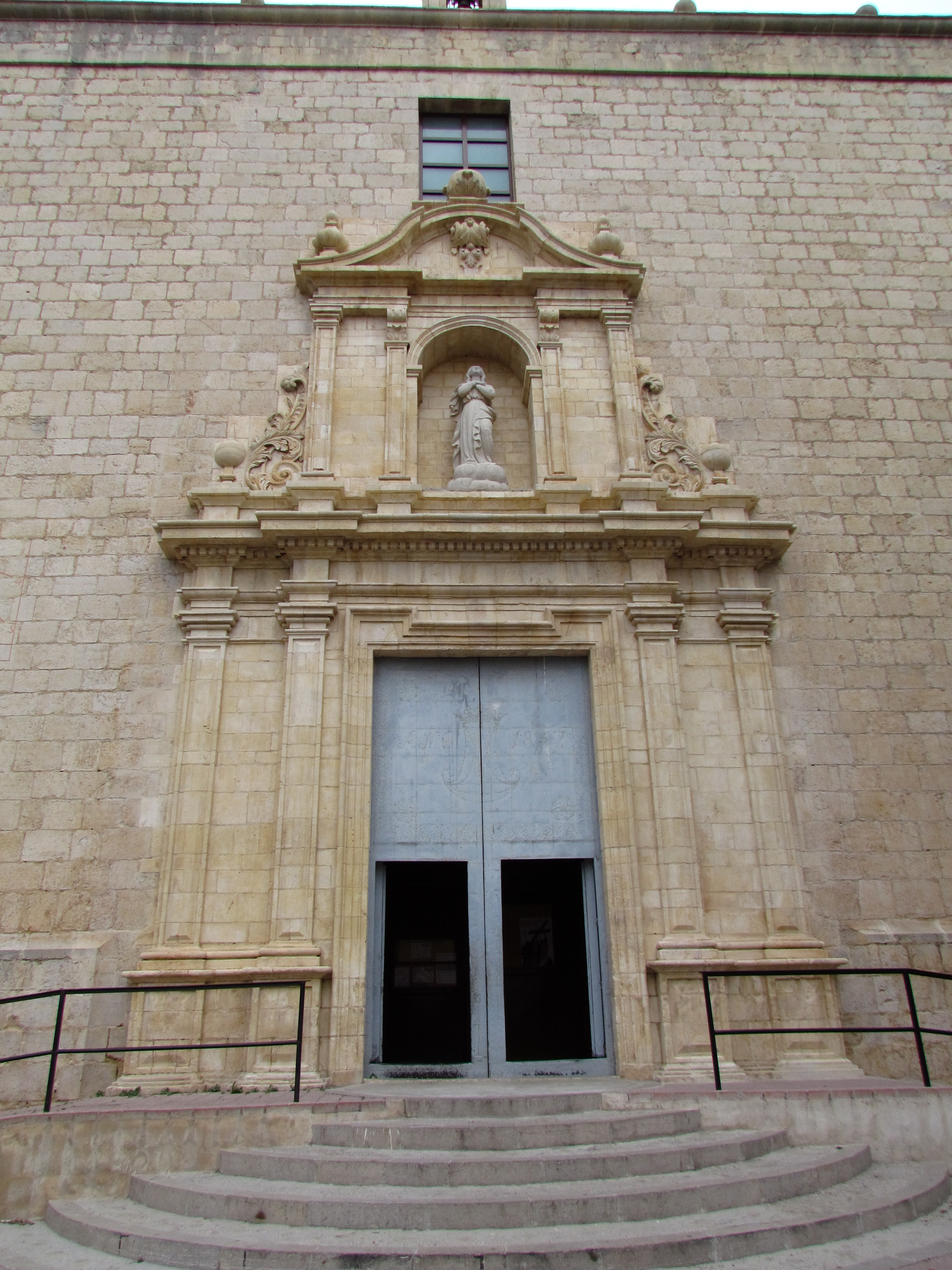 Portada de l'església de l'Assumpció d'Albocàsser, Alt Maestrat